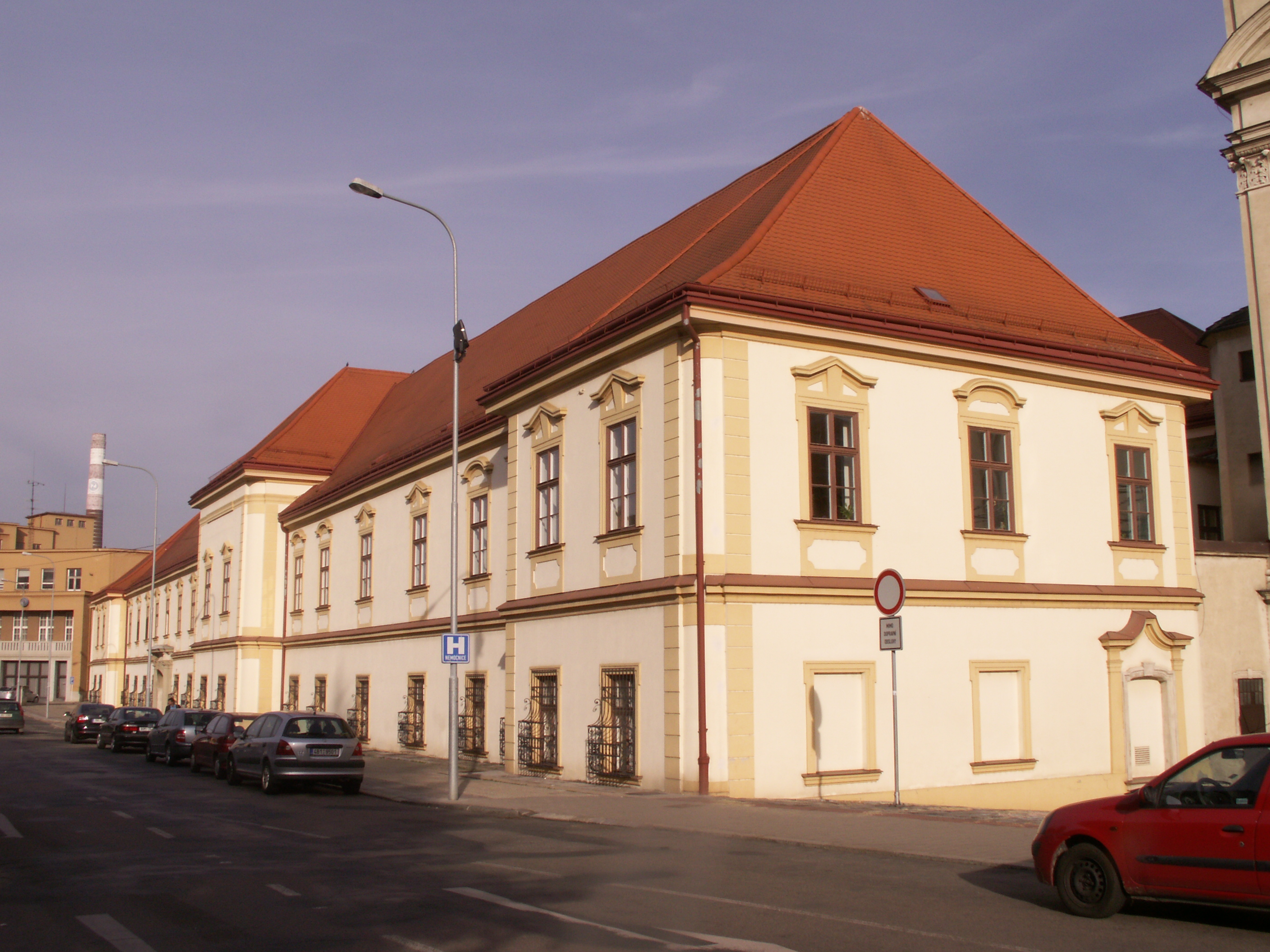 Klášter premonstrátský (Brno), Zábrdovice, Lazaretní 57/4, Brno